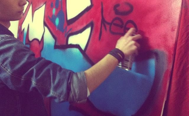 Գրաֆիտի անող Քեյ ։)